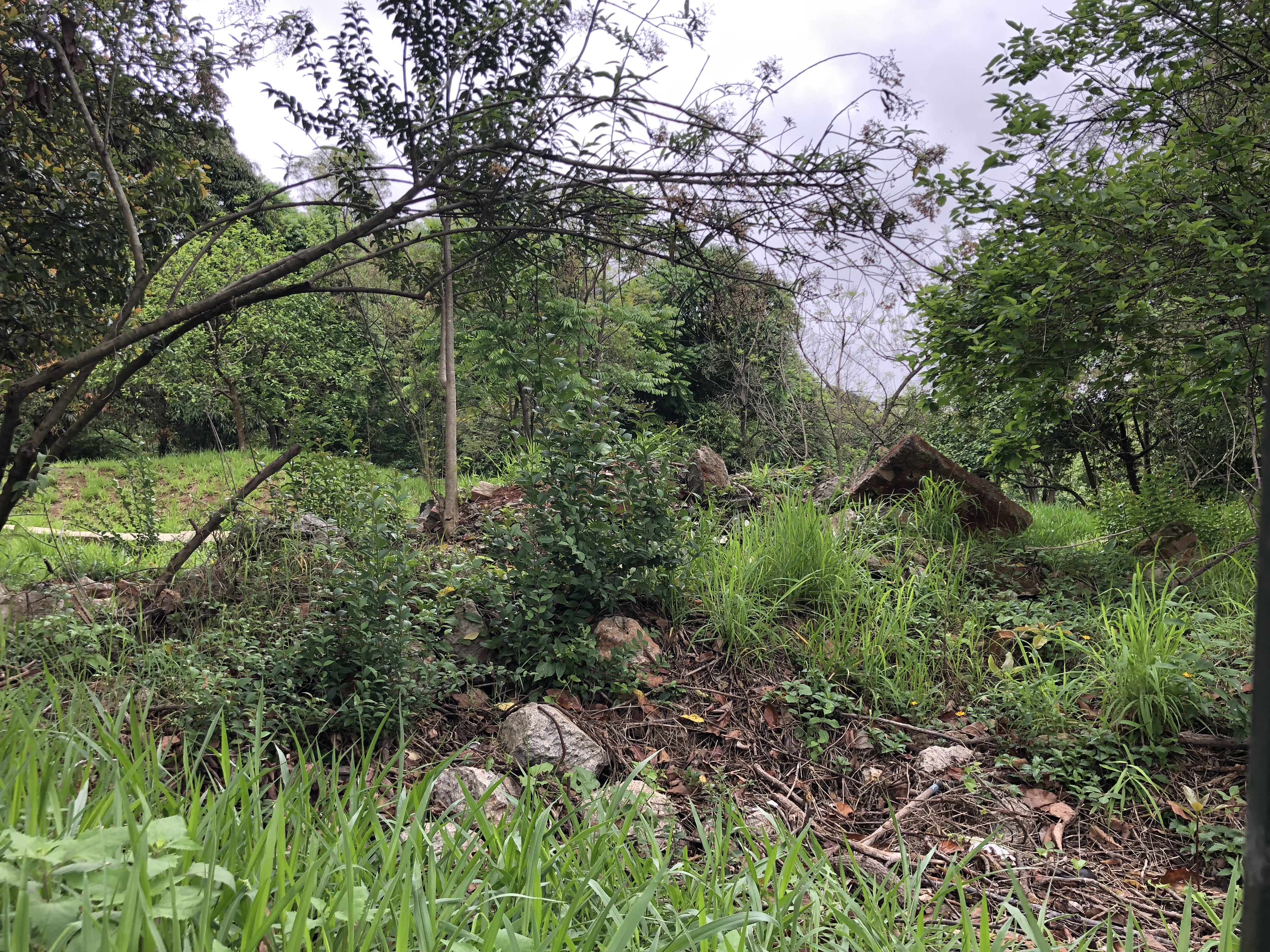 Ruínas restantes do lado direito da Capela do Bom Jesus do Horto, foto na horizontal, no Ipiranga em São Paulo (SP), Brasil.